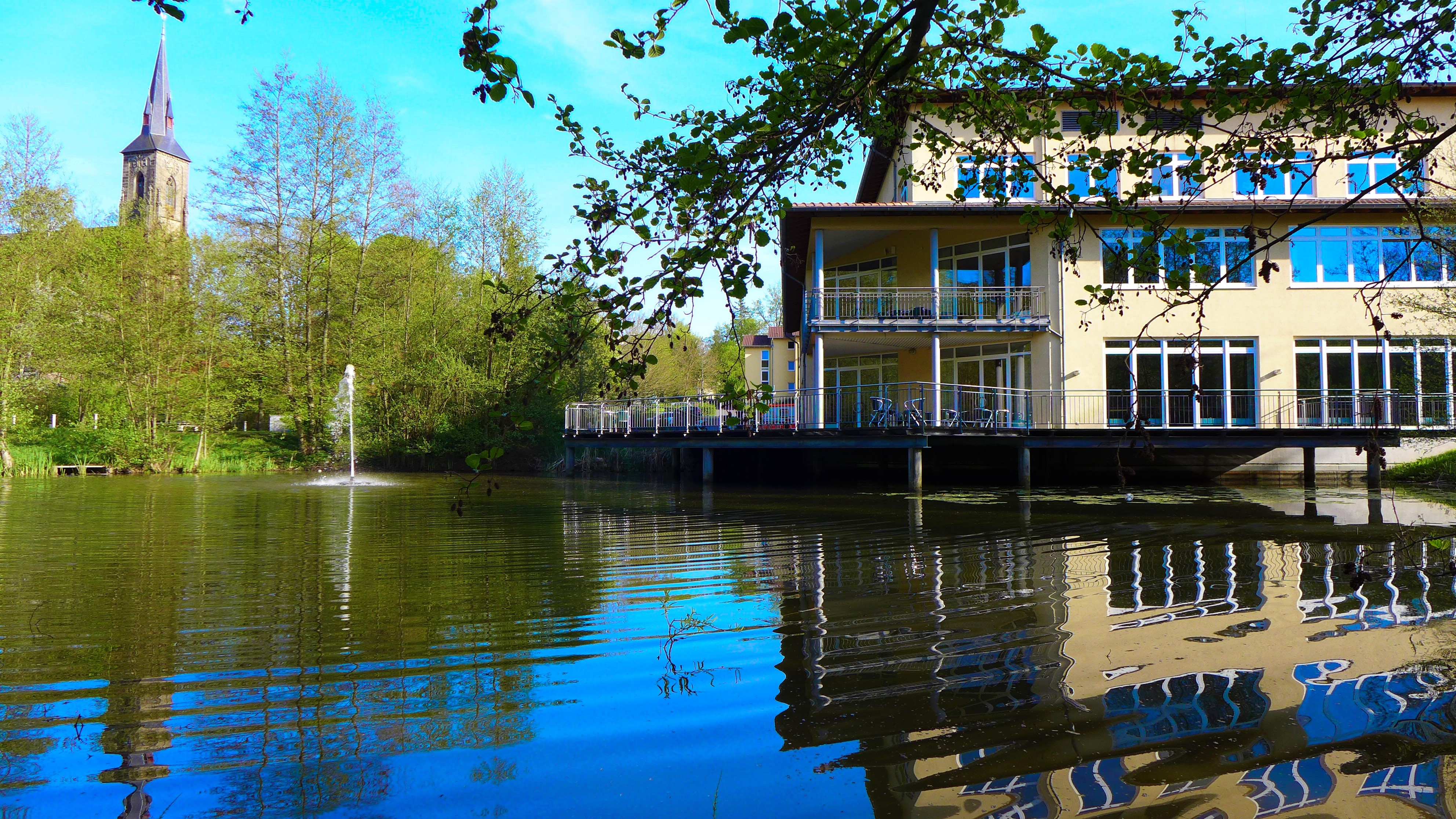 Wallerfangen, Fachklinik für Psychiatrie und Psychotherapie